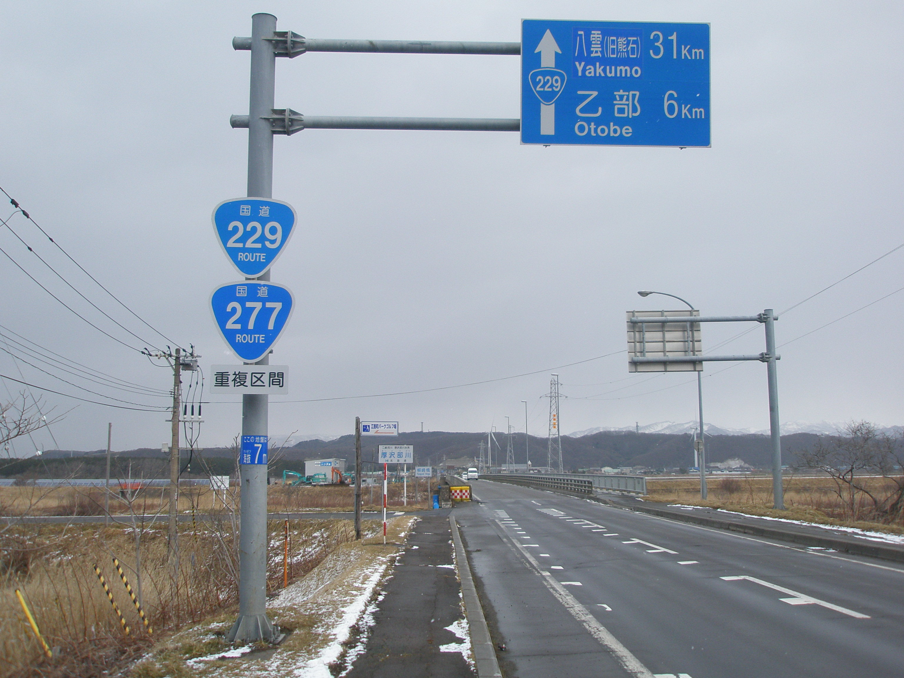 国道229号と国道277号の重複を示す標識及び国道番号重複表示の案内標識・方面及び距離（106-A）、江差町柳崎町（2019年3月撮影）